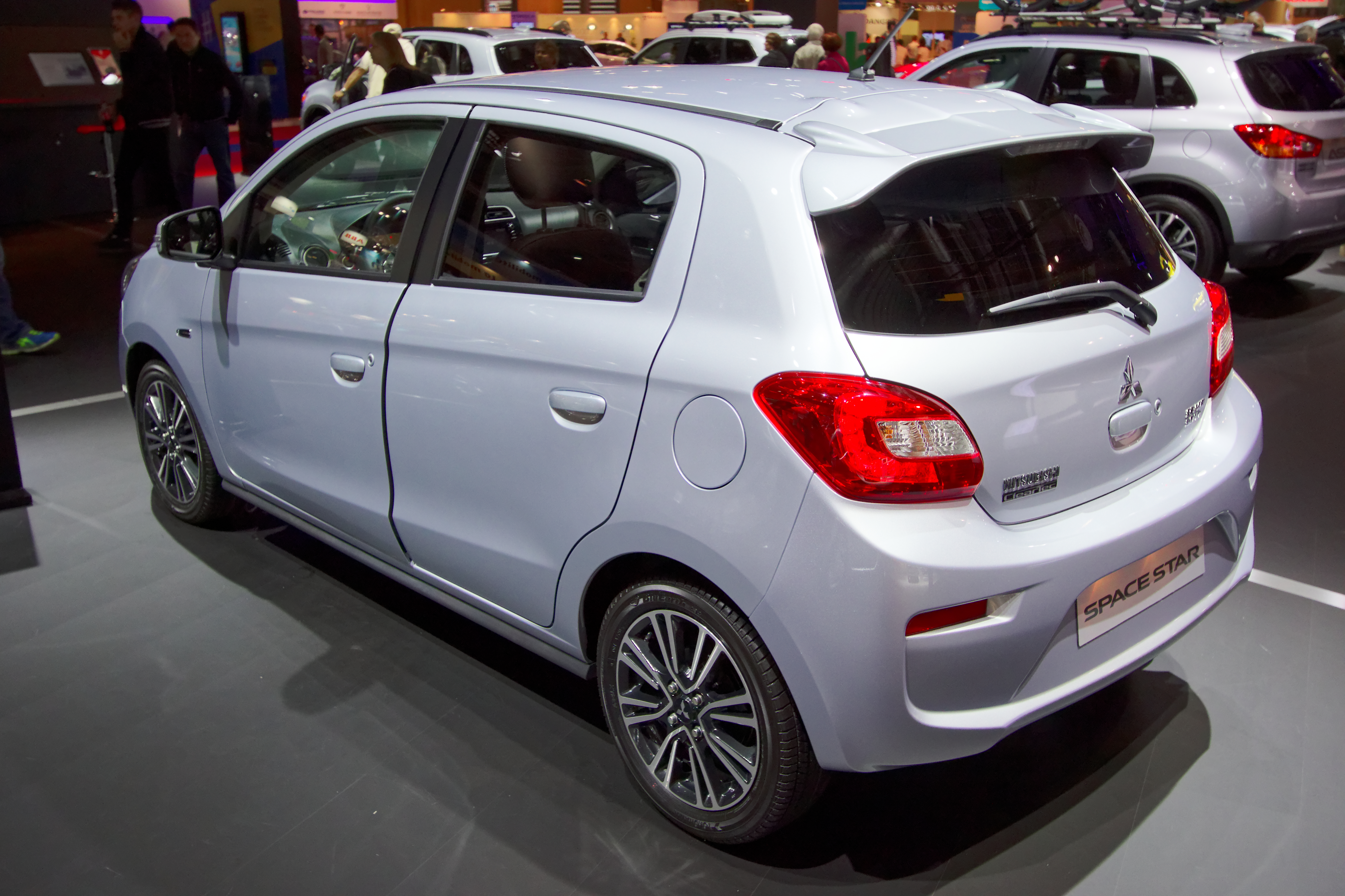 Une Mitsubishi Space Star présentée lors du mondial de l'automobile de Paris 2016.